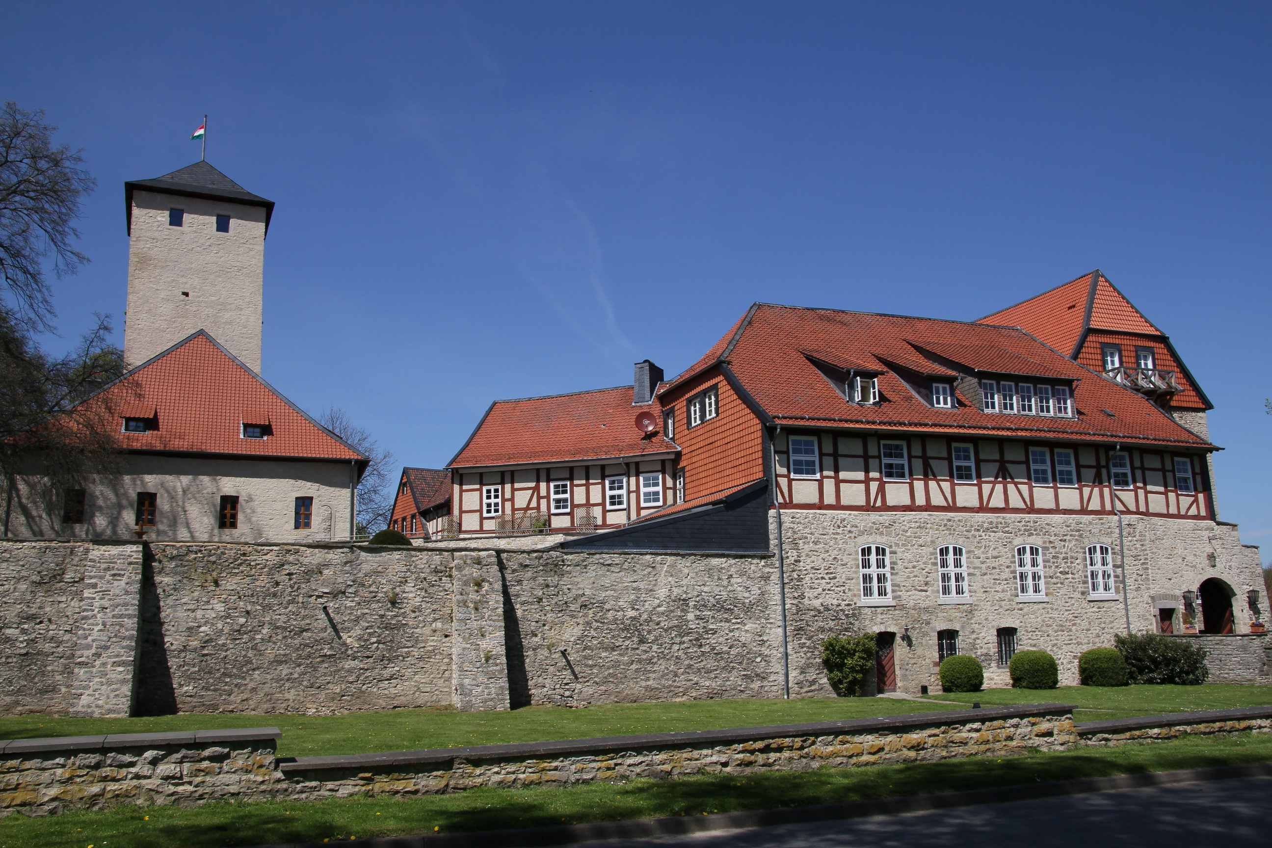 Burg Warberg im Landkreis Helmstedt.